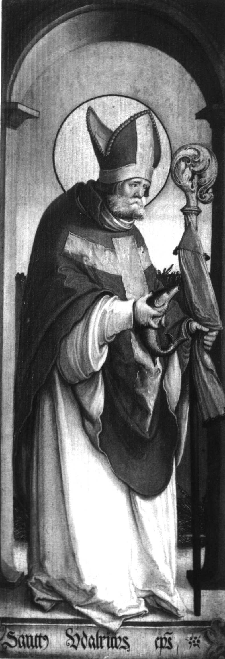 Ausstattung der ehemaligen Seitenaltäre der Meßkircher St. Martinskirche, Standflügel: Heiliger Ulrich mit Stab und Fisch